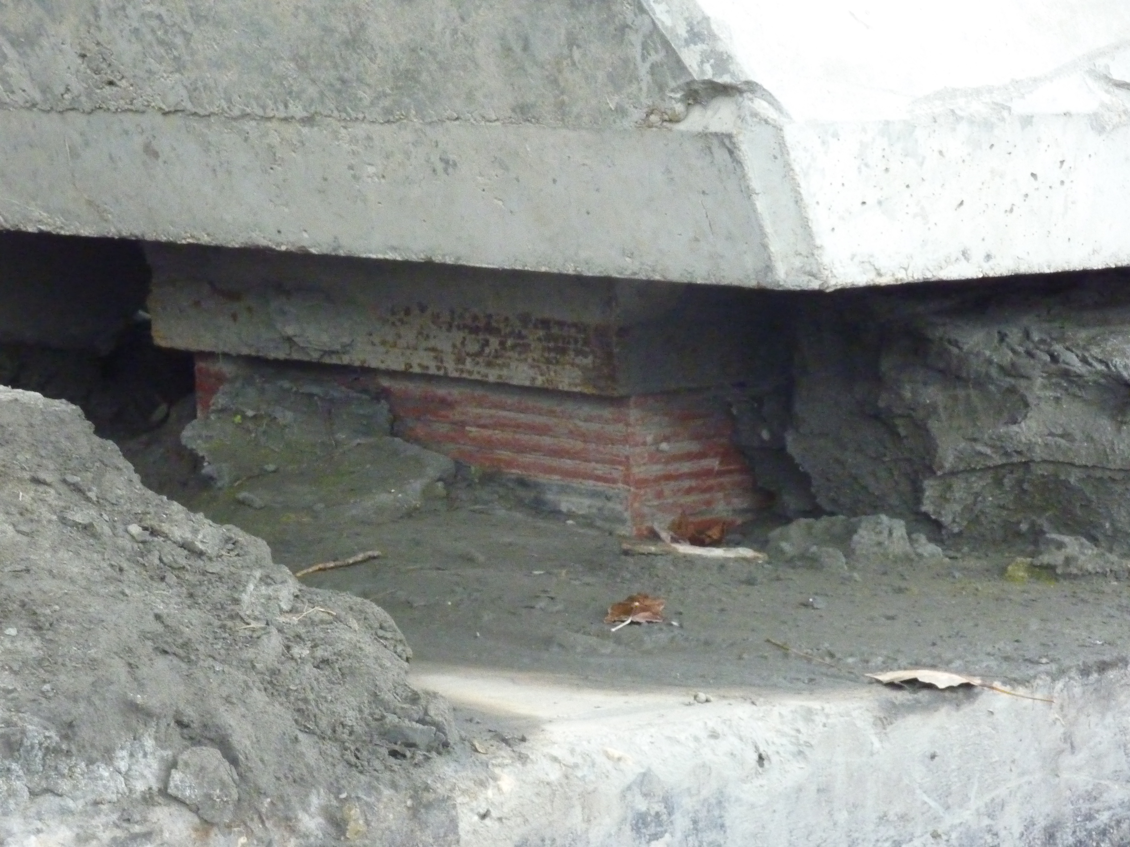 Appui néoprene